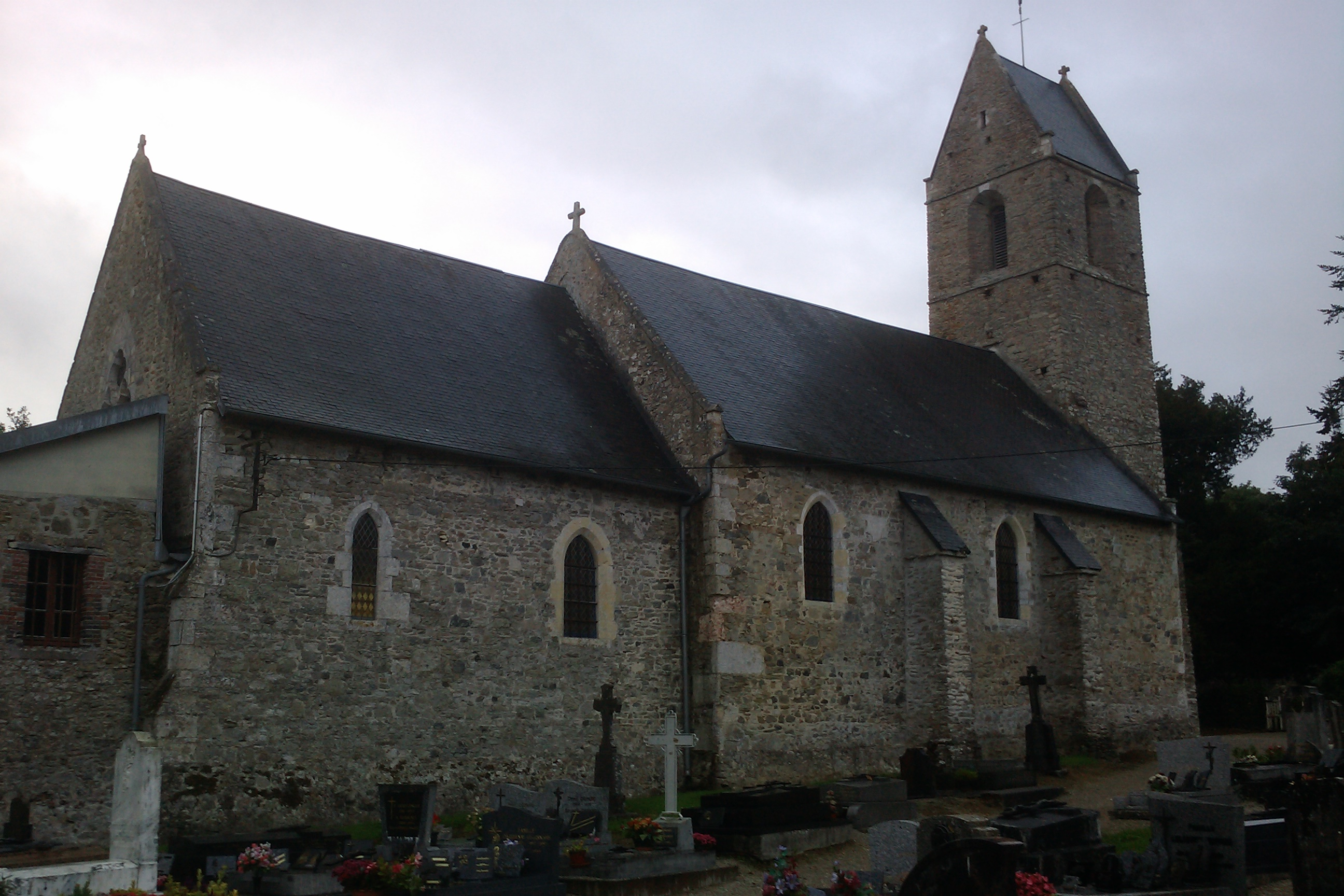 Église Notre-Dame de Montreuil-sur-Lozon